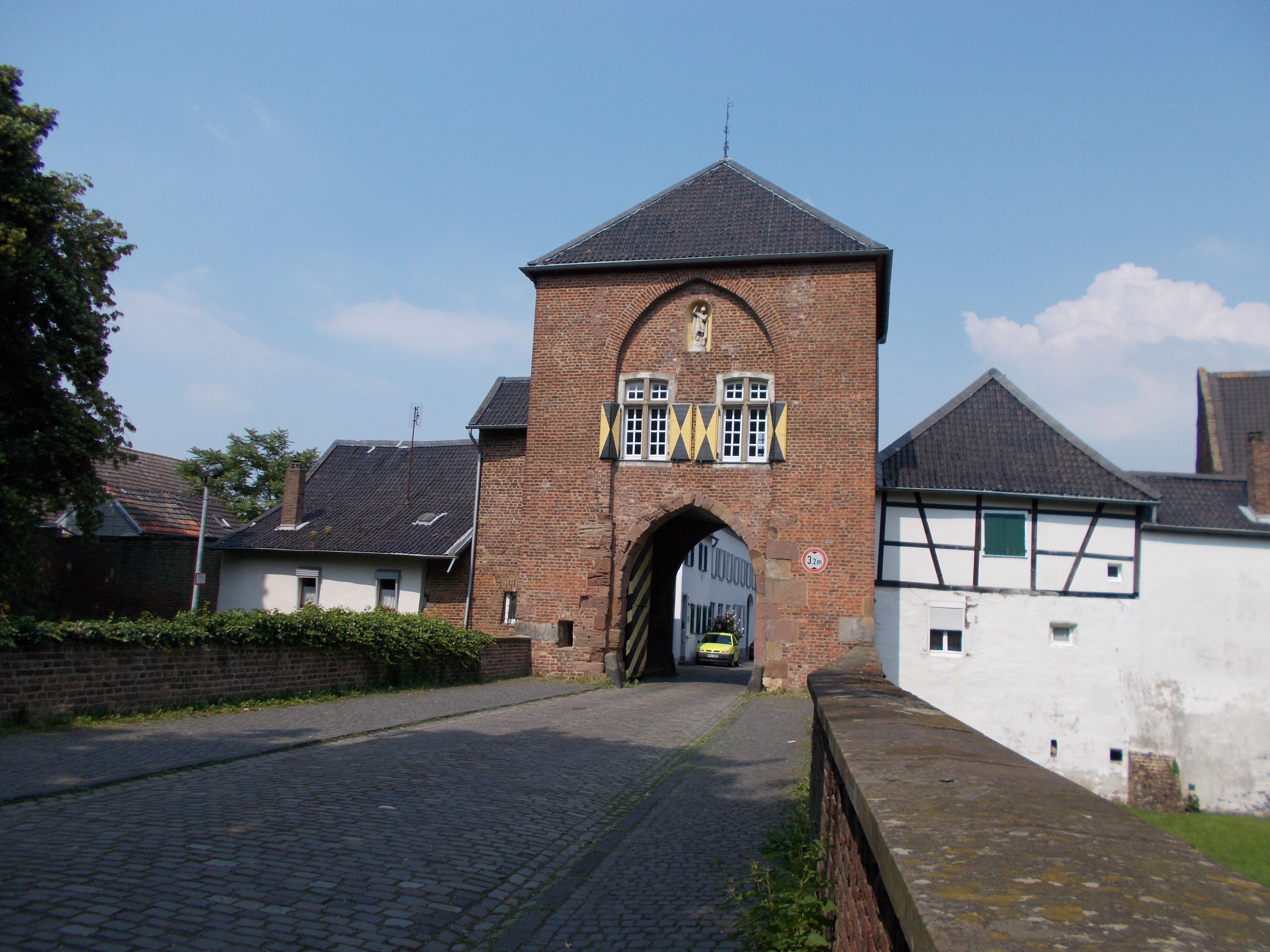 Das Agatha-Tor in Bedburg-Altkaster ist Ausgangspunkt des Werwolf-Wanderweges.